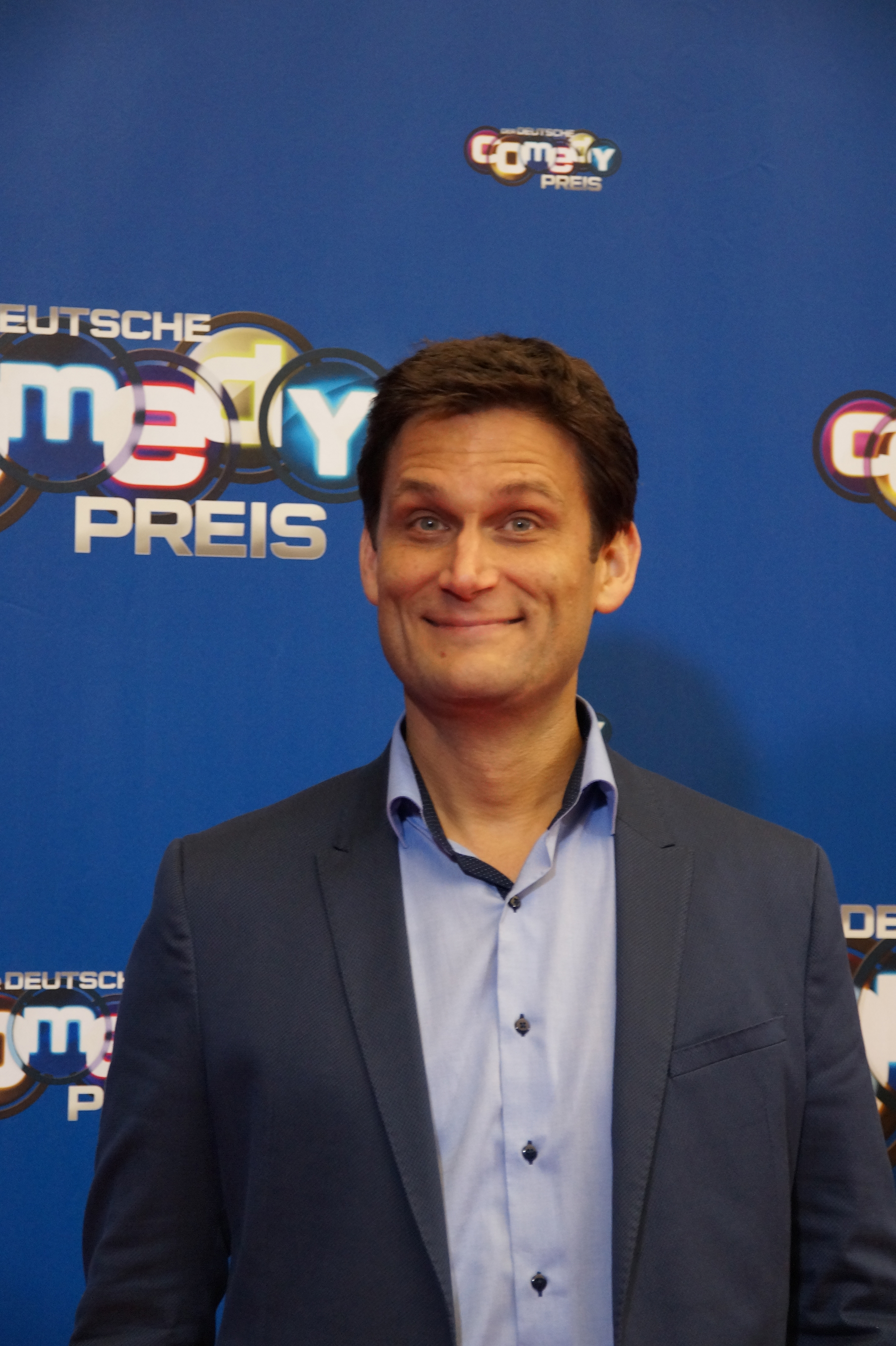 Christian Ehring beim Comedypreis 2016, im Oktober 2016, Köln.